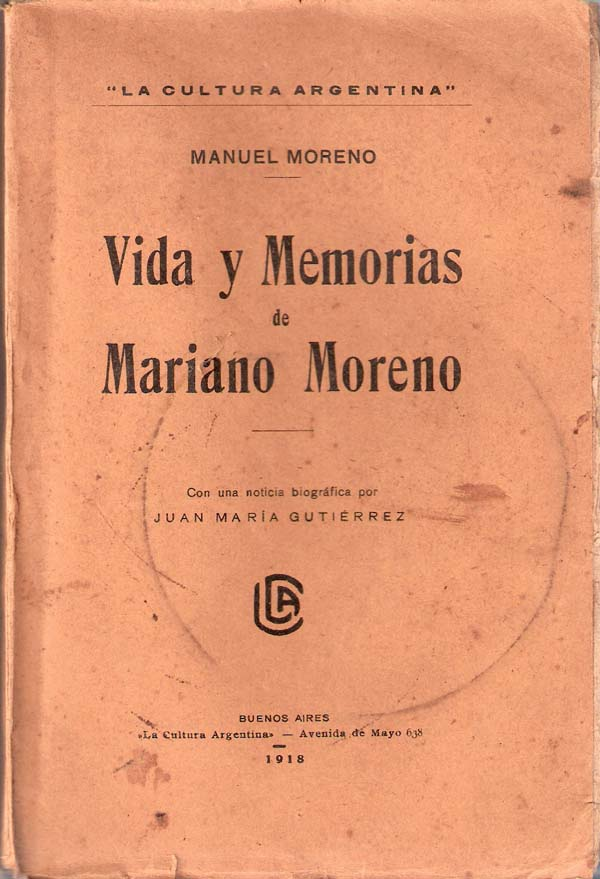 tapa del libro vida y memorias de mariano moreno